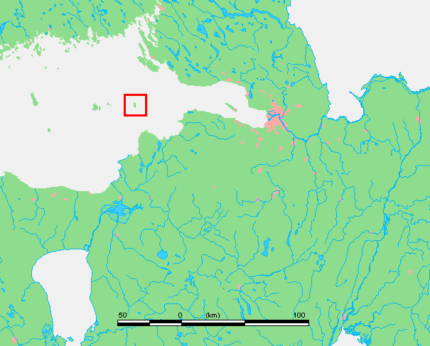 Seskar